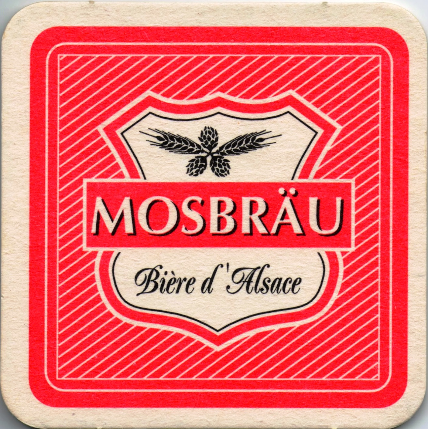 Sous-bock de la bière Mosbräu, brassée par la brasserie Amos, en France.